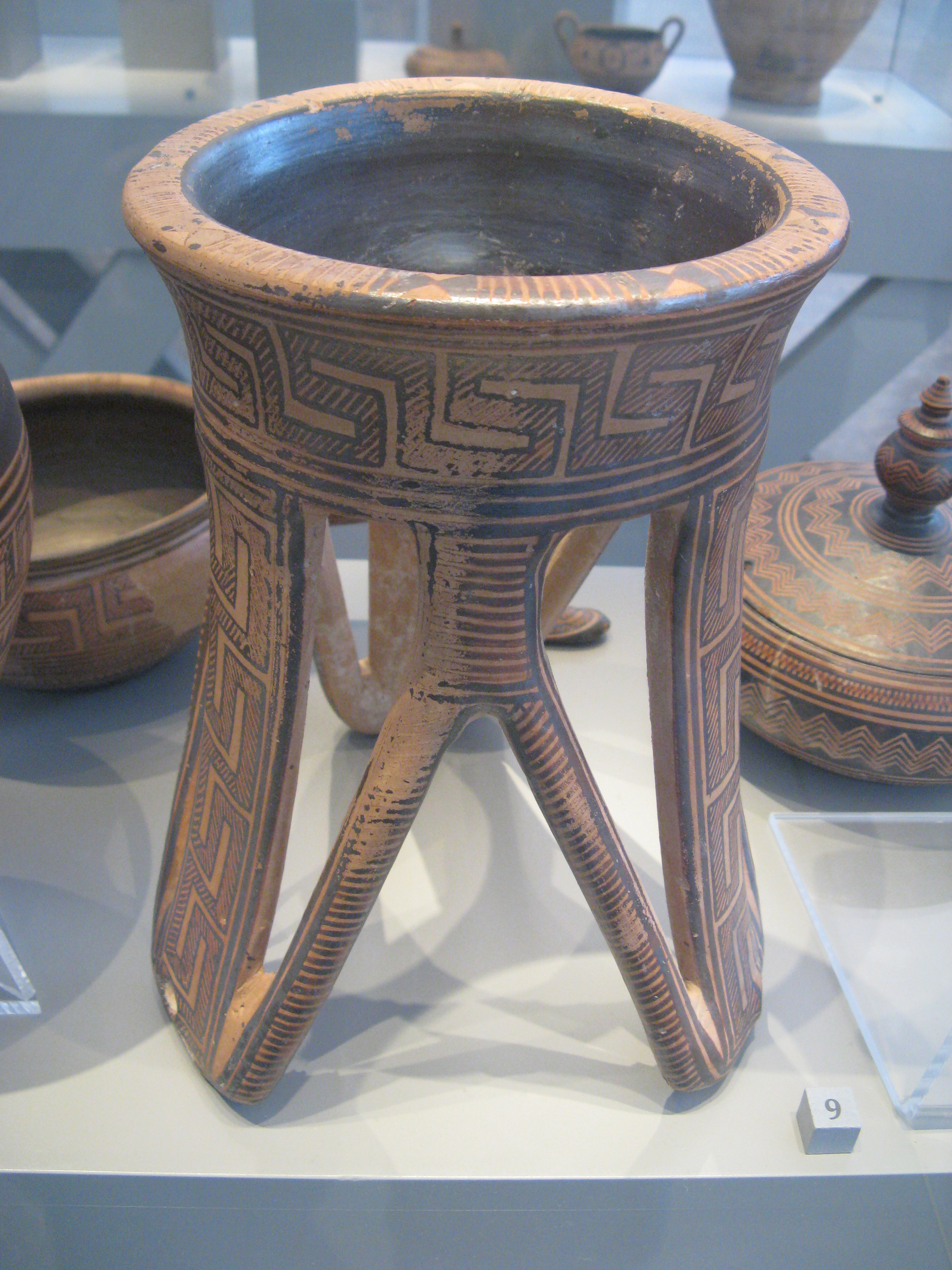 Gruppe attisch-frühgeometrischer Tongefäße (Ende der frühgeometrischen Zeit) um 850 v. Chr.; erworben 1909 im Kunsthandel in München; Dreifuß; Inventarnummer V.I. 4985